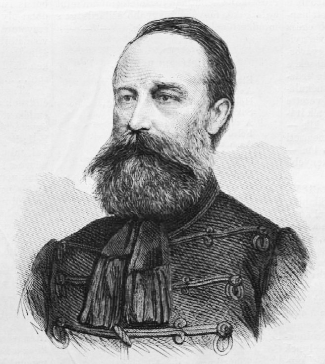 Urházy György (1823–1873) politikus, újságíró, honvédtiszt, a Magyar Tudományos Akadémia levelező tagja